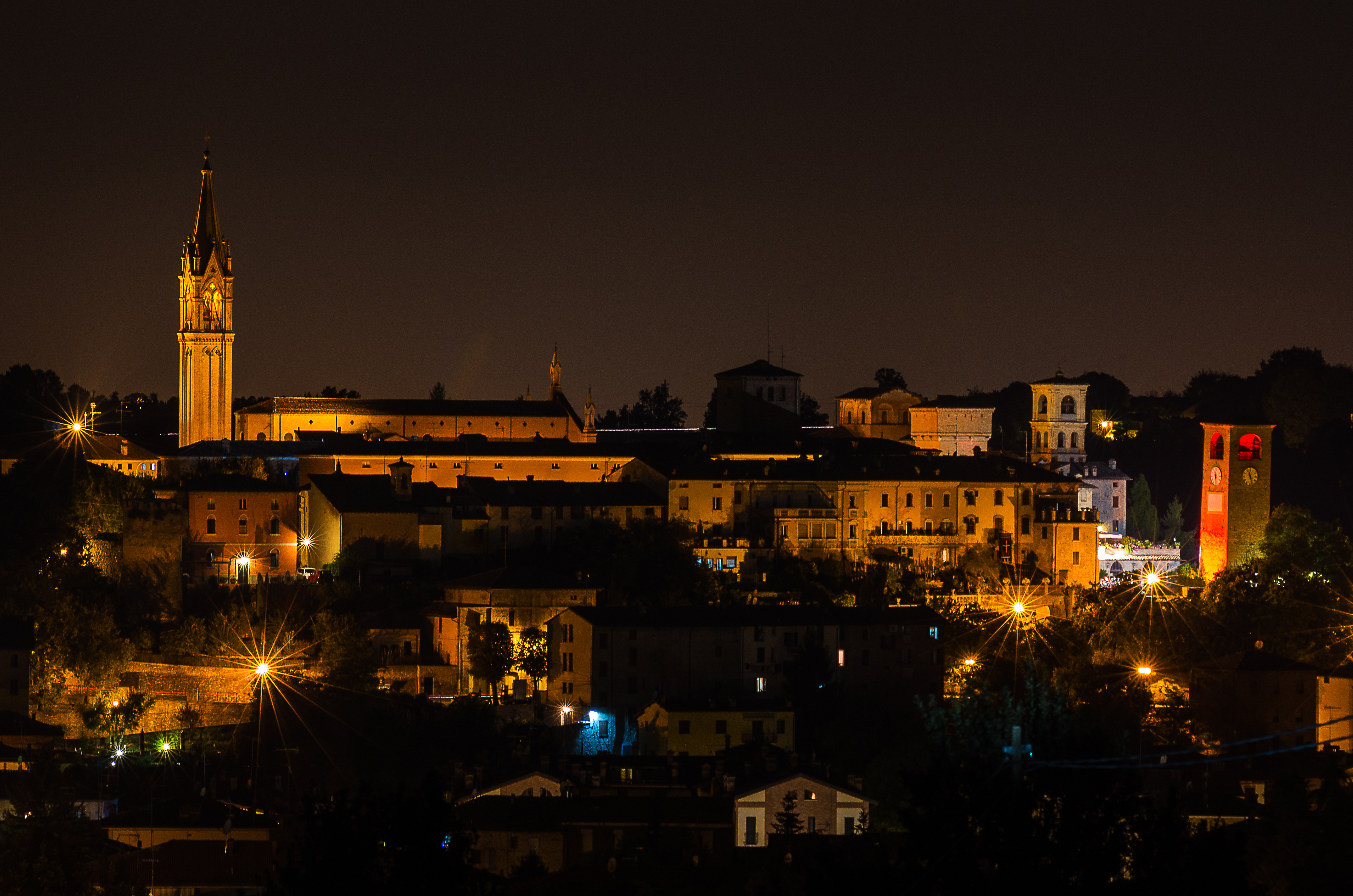 Centro storico This is a photo of a monument which is part of cultural heritage of Italy.